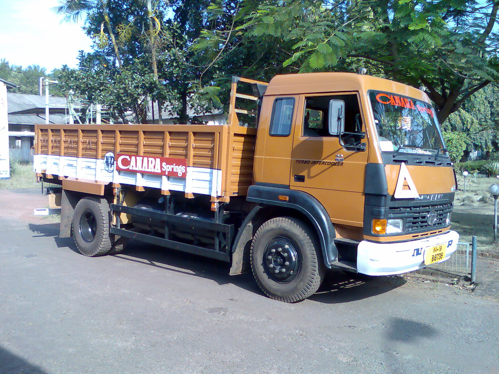 Tata 1613 truck